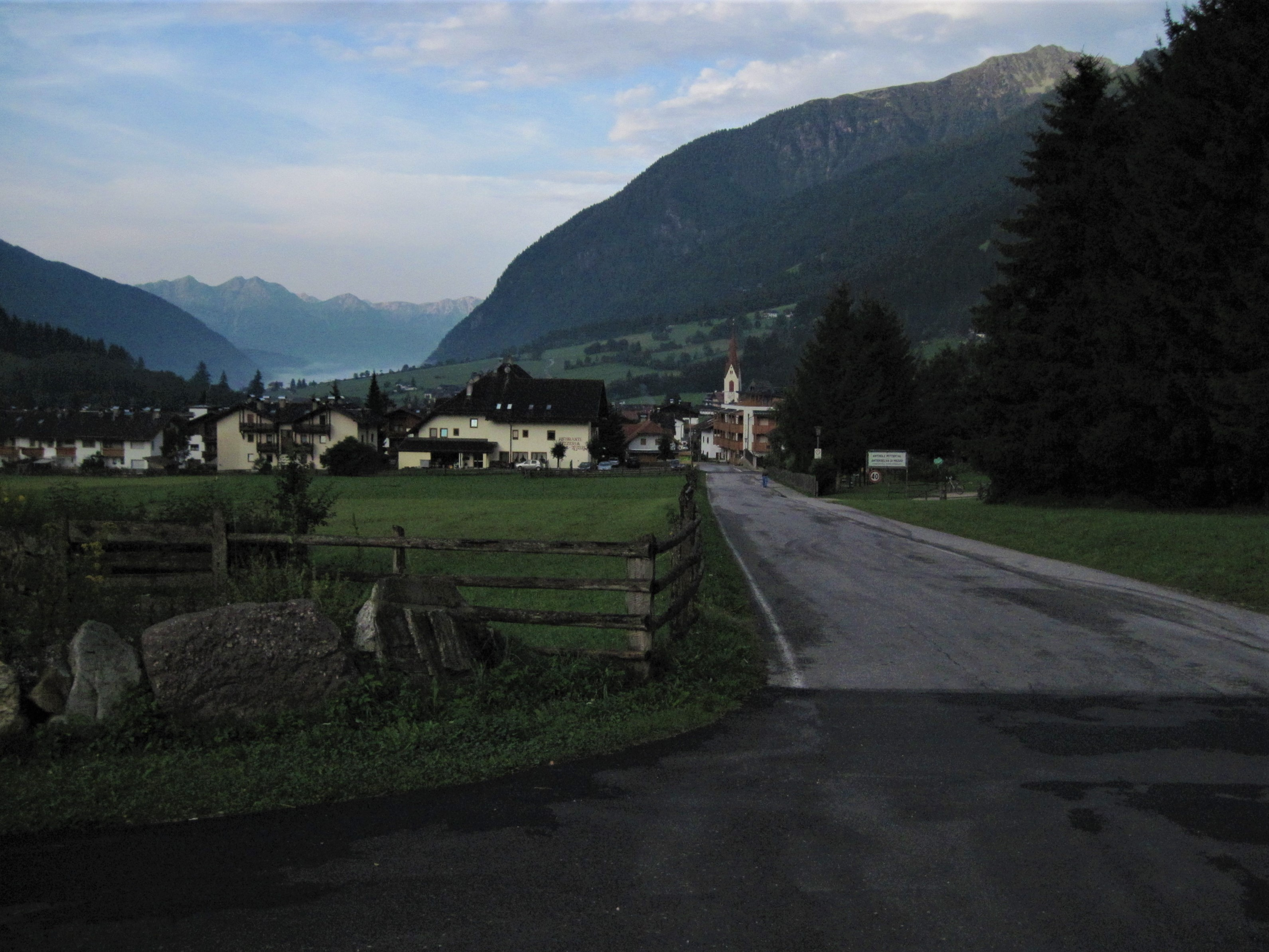 Chiesa di Anterselva di Mezzo e panorama del piccolo centro.